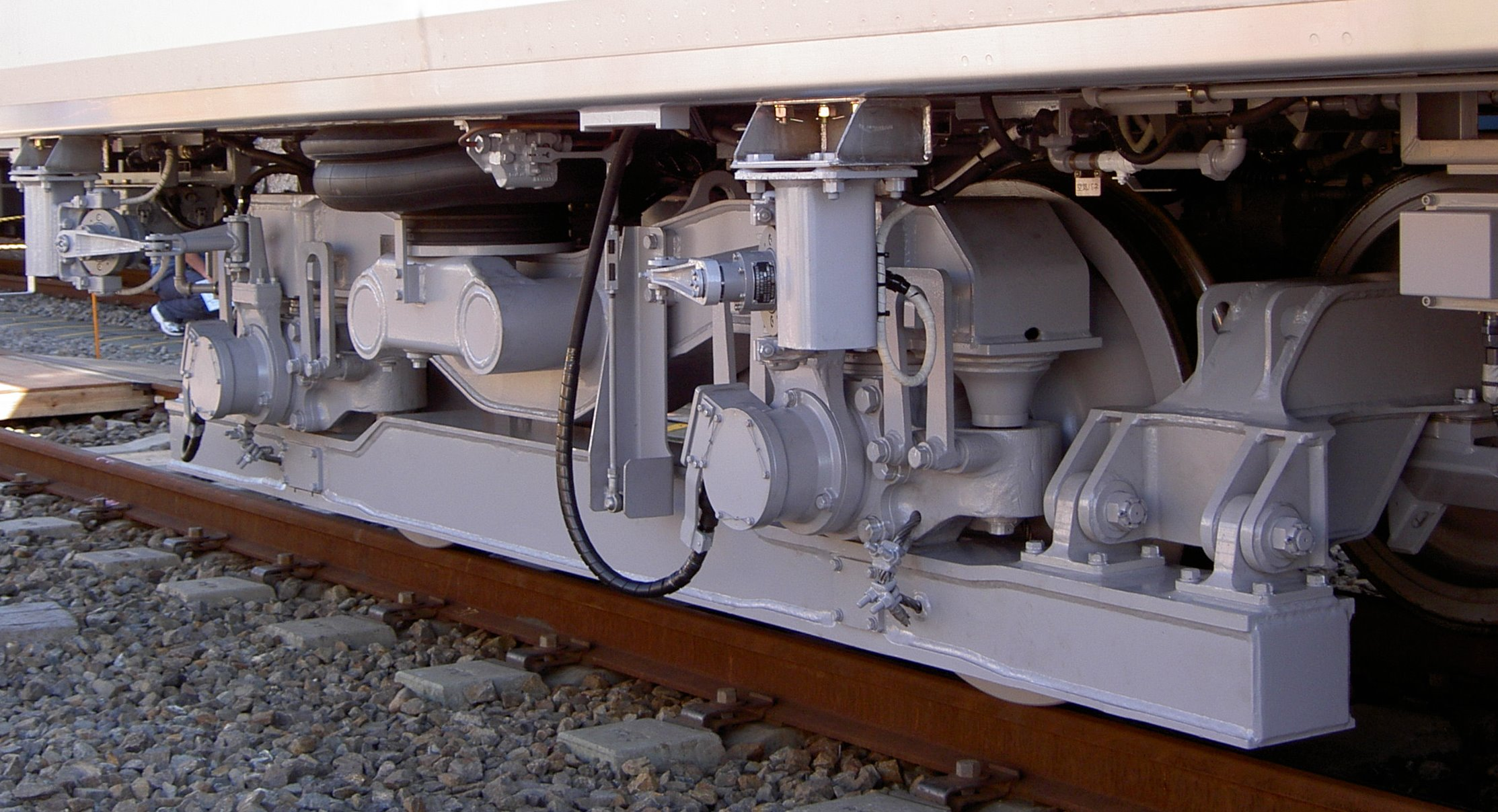 小田急クヤ31形総合検測車のTS-1028形台車